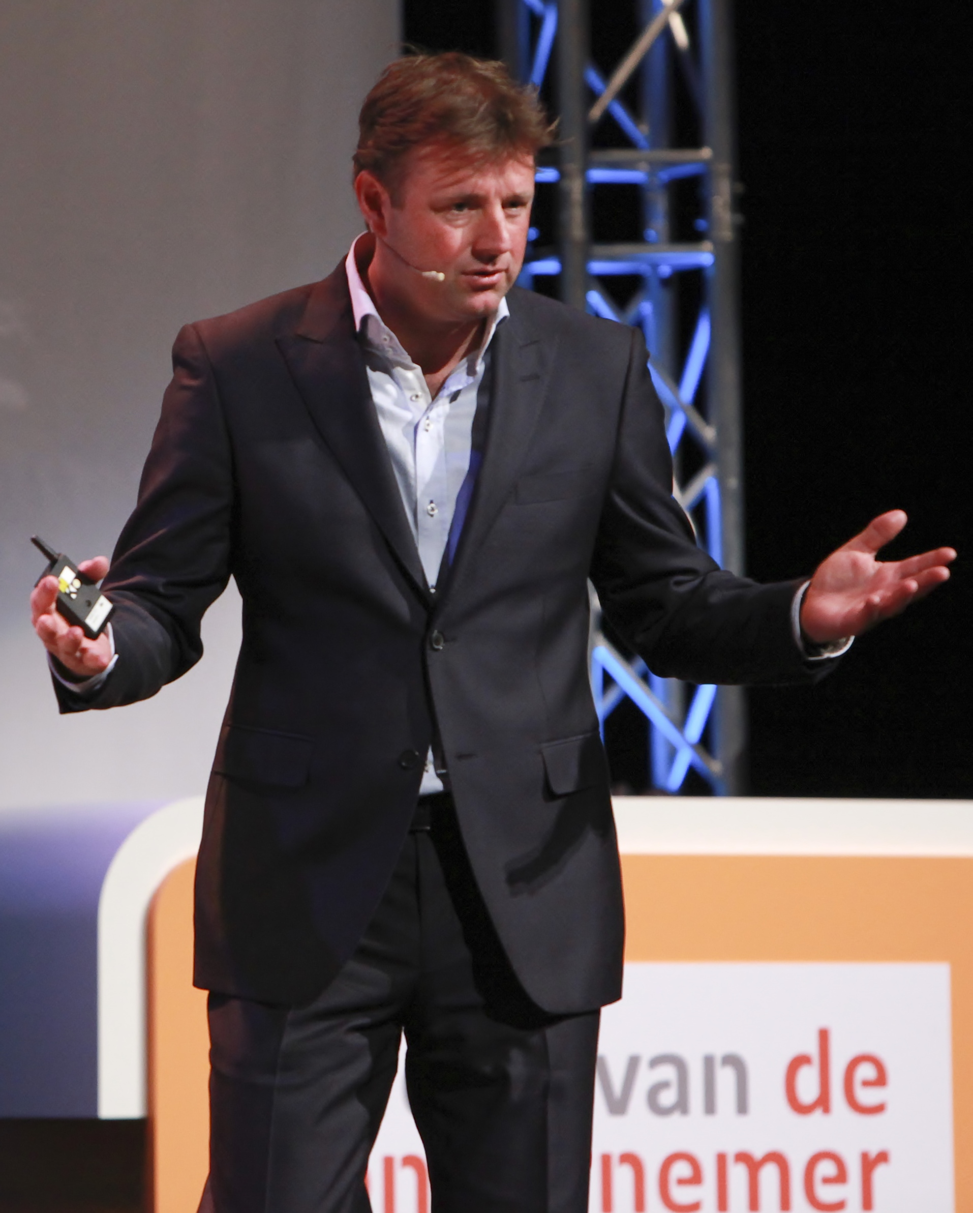 Marc Lammers tijdens de Week van de Ondernemer op 12 april 2011.